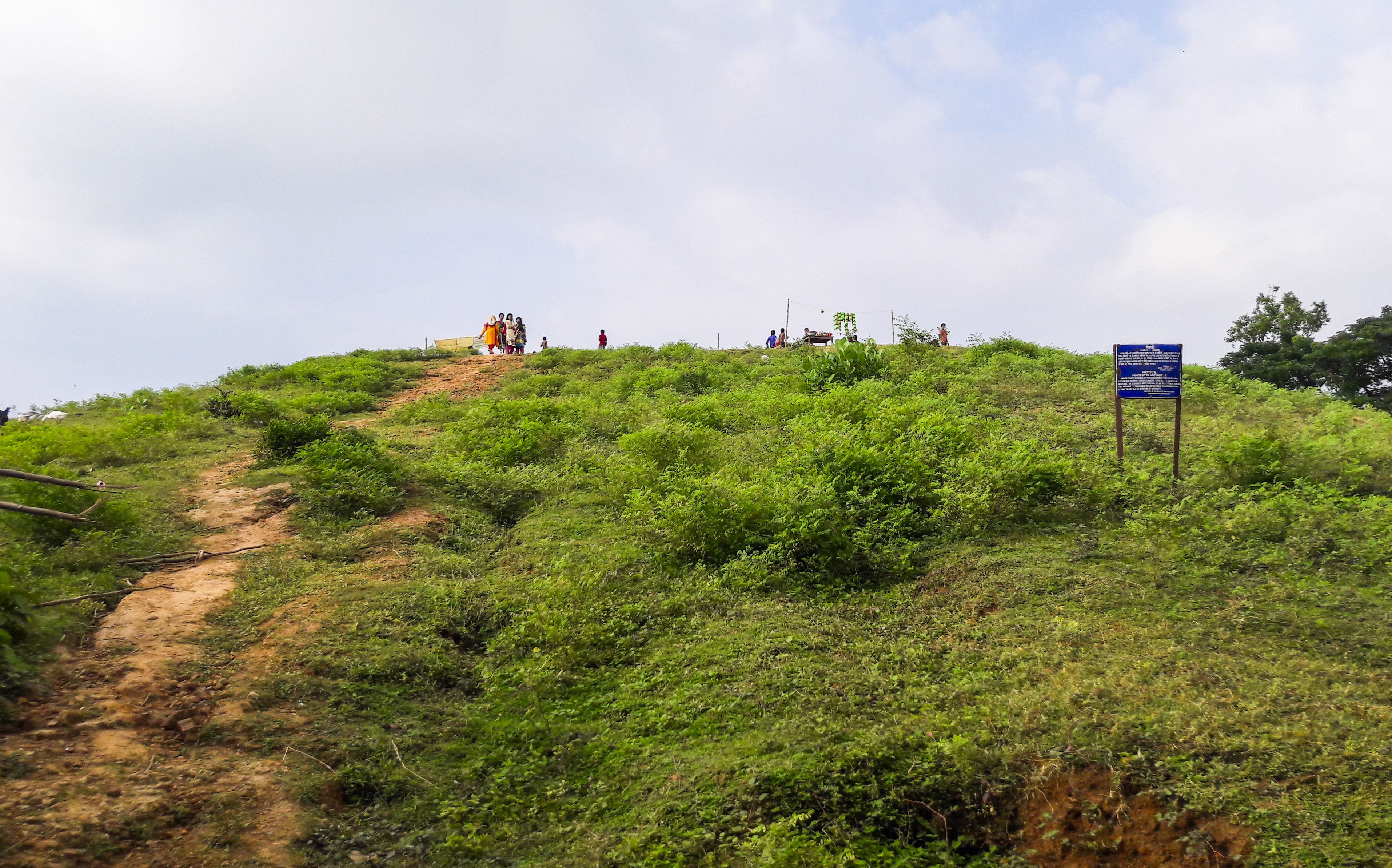 নওদা বুরুজ চাঁপাইনবাবগঞ্জ জেলার গোমস্তাপুর উপজেলার রহনপুরে অবস্থিত বর্তমানে সর্ব প্রাচীন প্রত্নসম্পদ ও লুকায়িত ইতিহাস সমৃদ্ধ স্থান। স্থানীয়ভাবে এটি ষাঁড়বুরুজ নামেও পরিচিত।